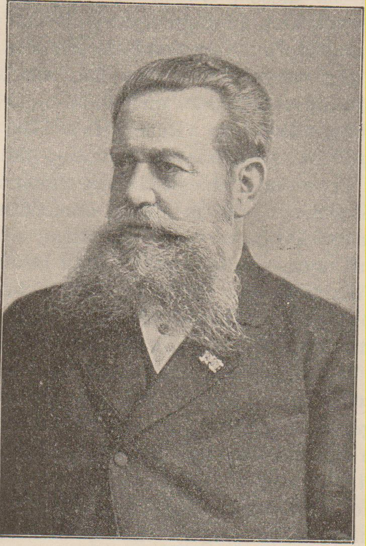 Pionier der Ansichtskarte August Schwartz (1837-1904) aus Oldenburg